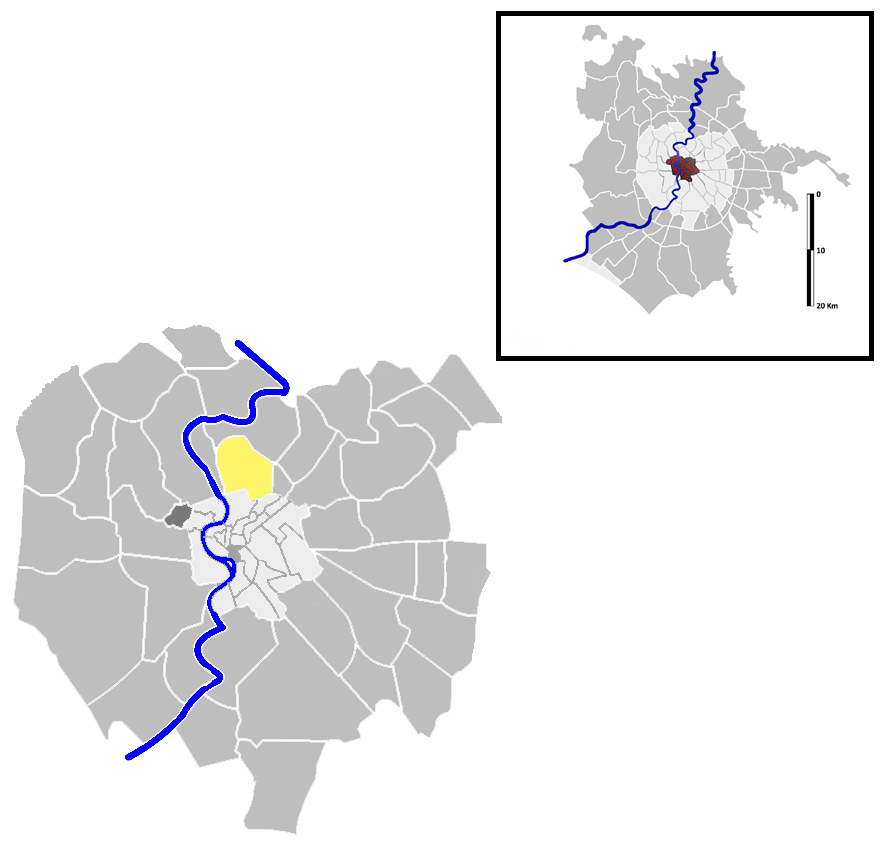 Pinciano